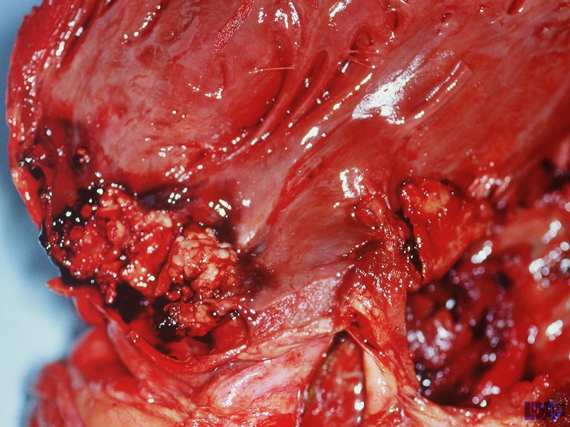 Lésion valvulaire cardiaque à Rouget